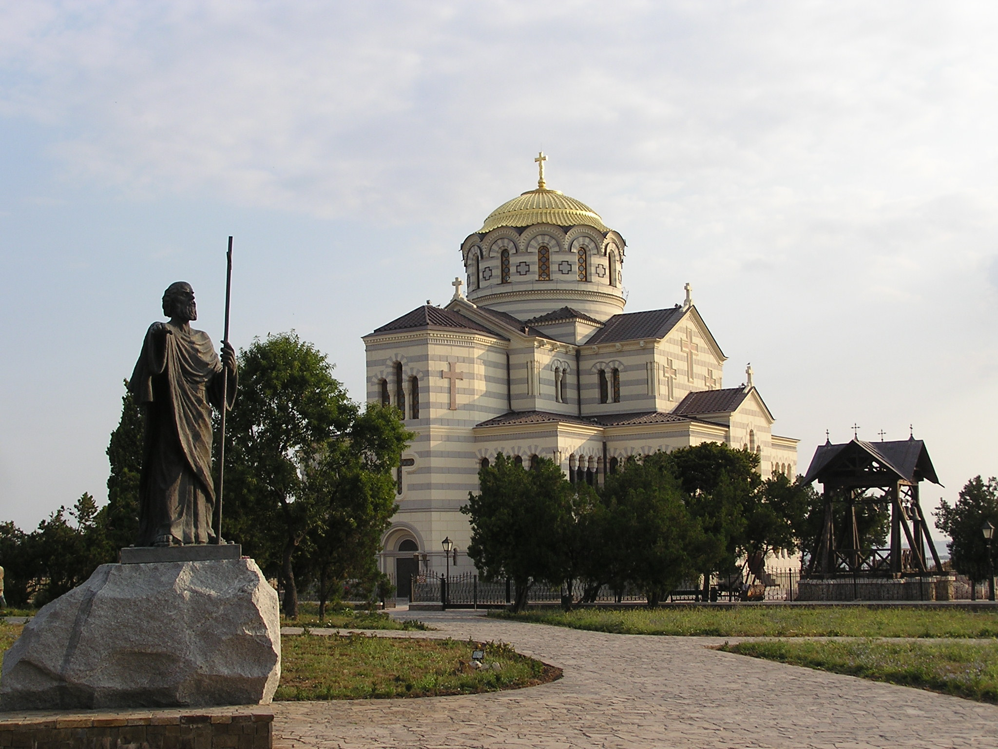 Херсонес. Храм святого Владимира